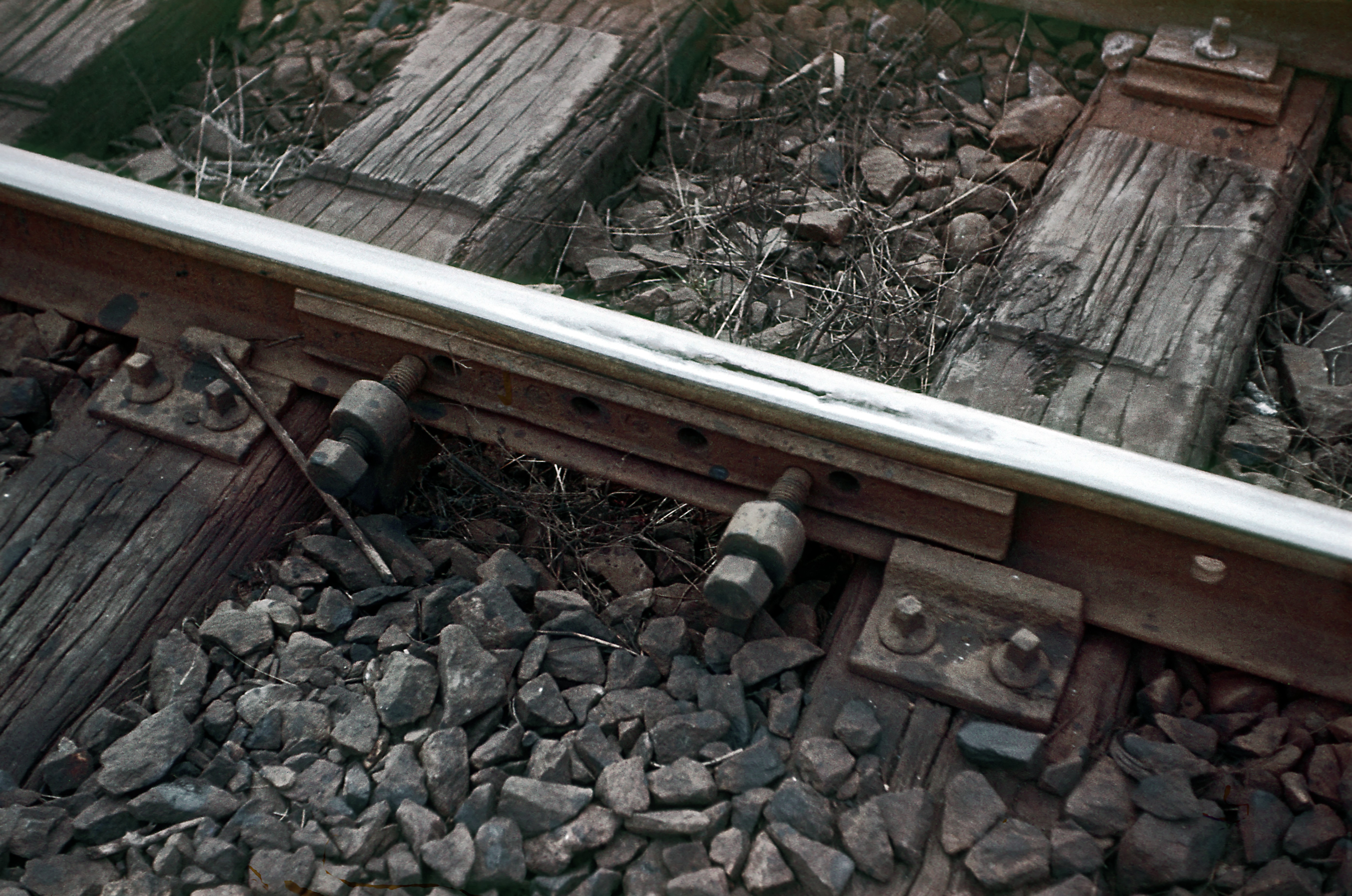 Behelfsmäßige Sicherung eines Schienenfehlers, viel wollte man seinerzeit in die Schmalspurstrecken nicht mehr investieren. Nur so konnte der preußische Hakenplattenoberbau bis in die Achtziger überleben.